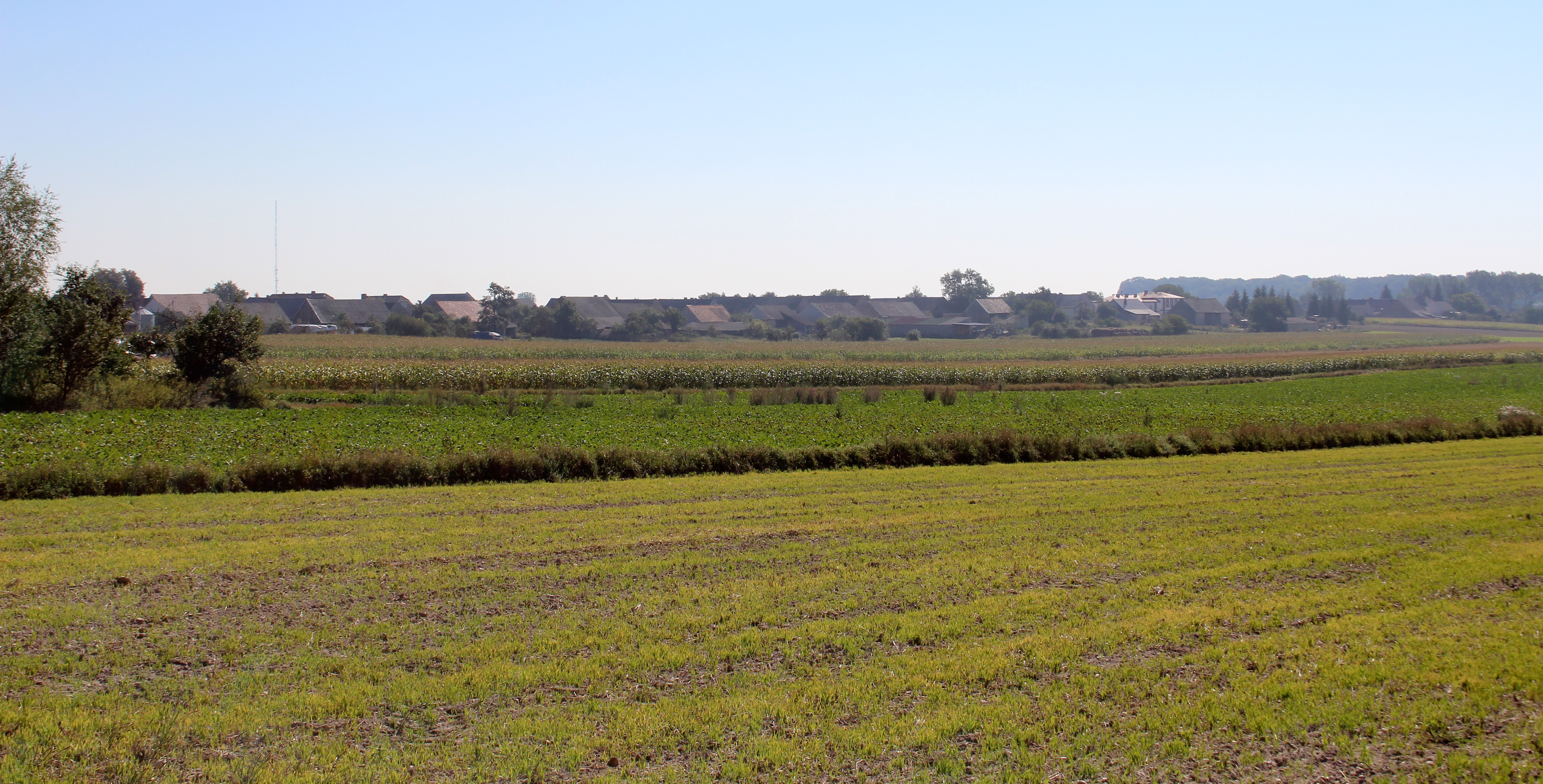 Rzymkowice - wieś w Polsce w województwie opolskim, w powiecie nyskim w gminie Korfantów.